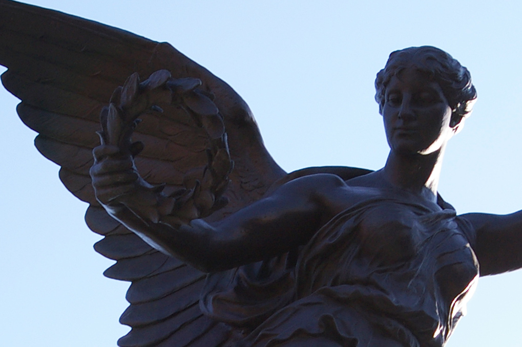 Détail du cénotaphe de Sherbrooke, Le Monument aux braves (1926) , réalisé par le sculpteur George William Hill (1862-1934)